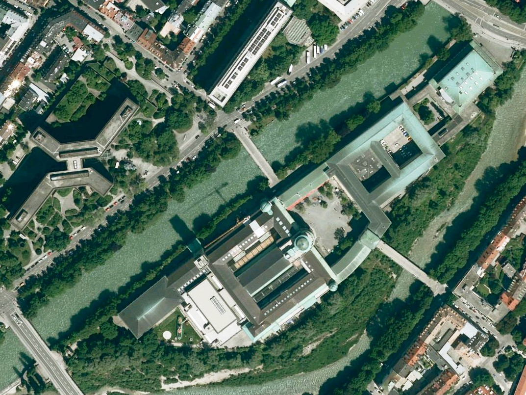 Luftaufnahme der Bayerischen Vermessungsverwaltung: Deutsches Museum auf der Museumsinsel in München, Bayern. Am linken Bildrand Gebäude des Europäischen Patentamts, am oberen Bildrand des Deutschen patent- und Markenamts.